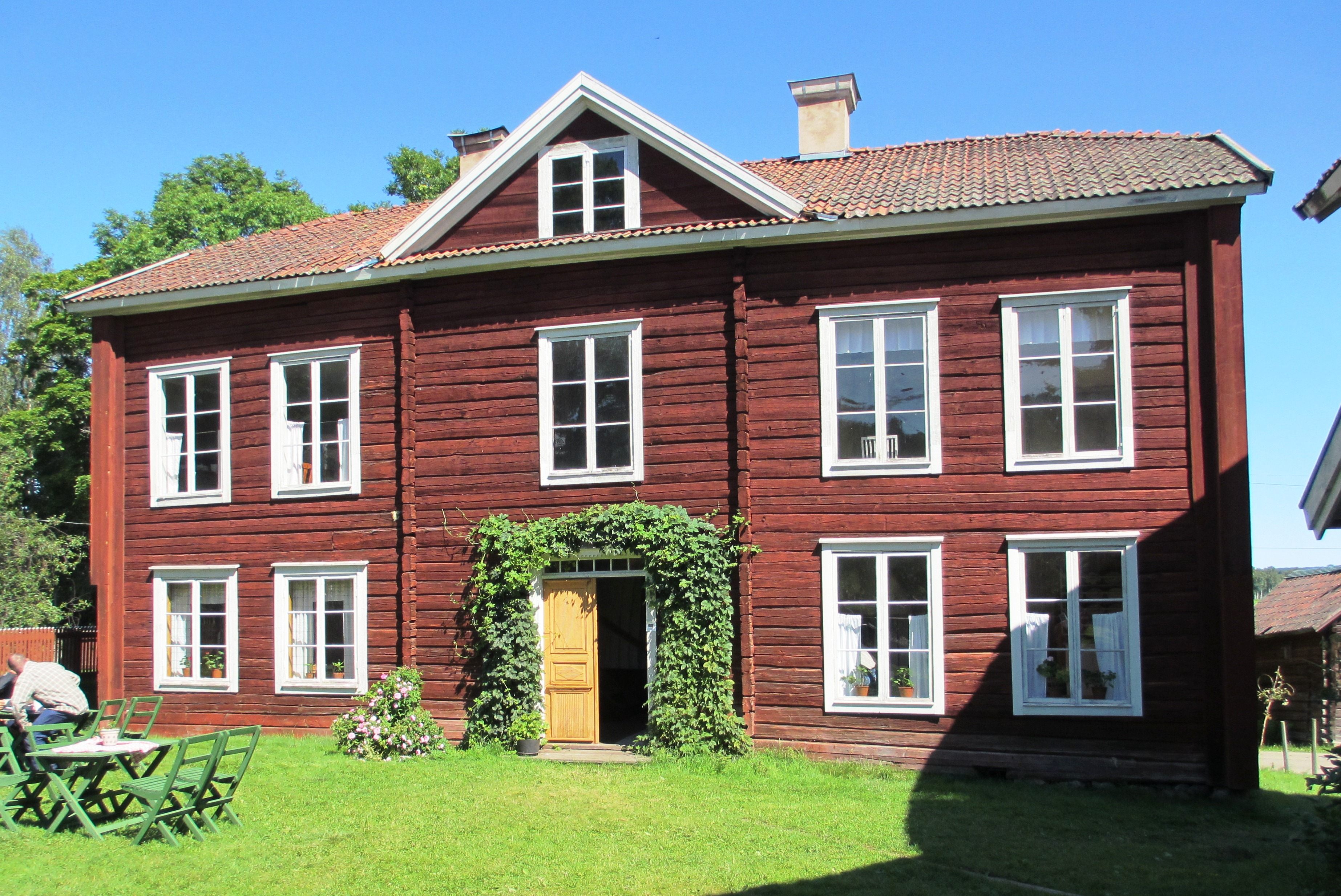 Erik-Anders i Asta, Söderala socken, Hälsingland